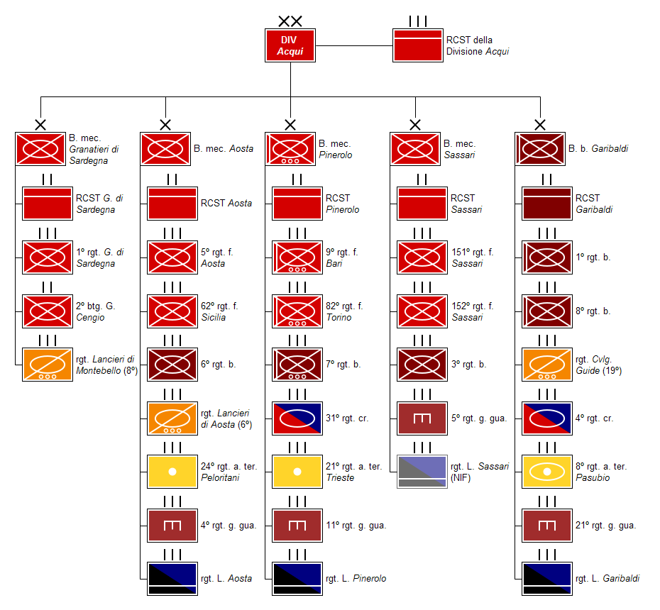 Attuale struttura della Divisione "Acqui".